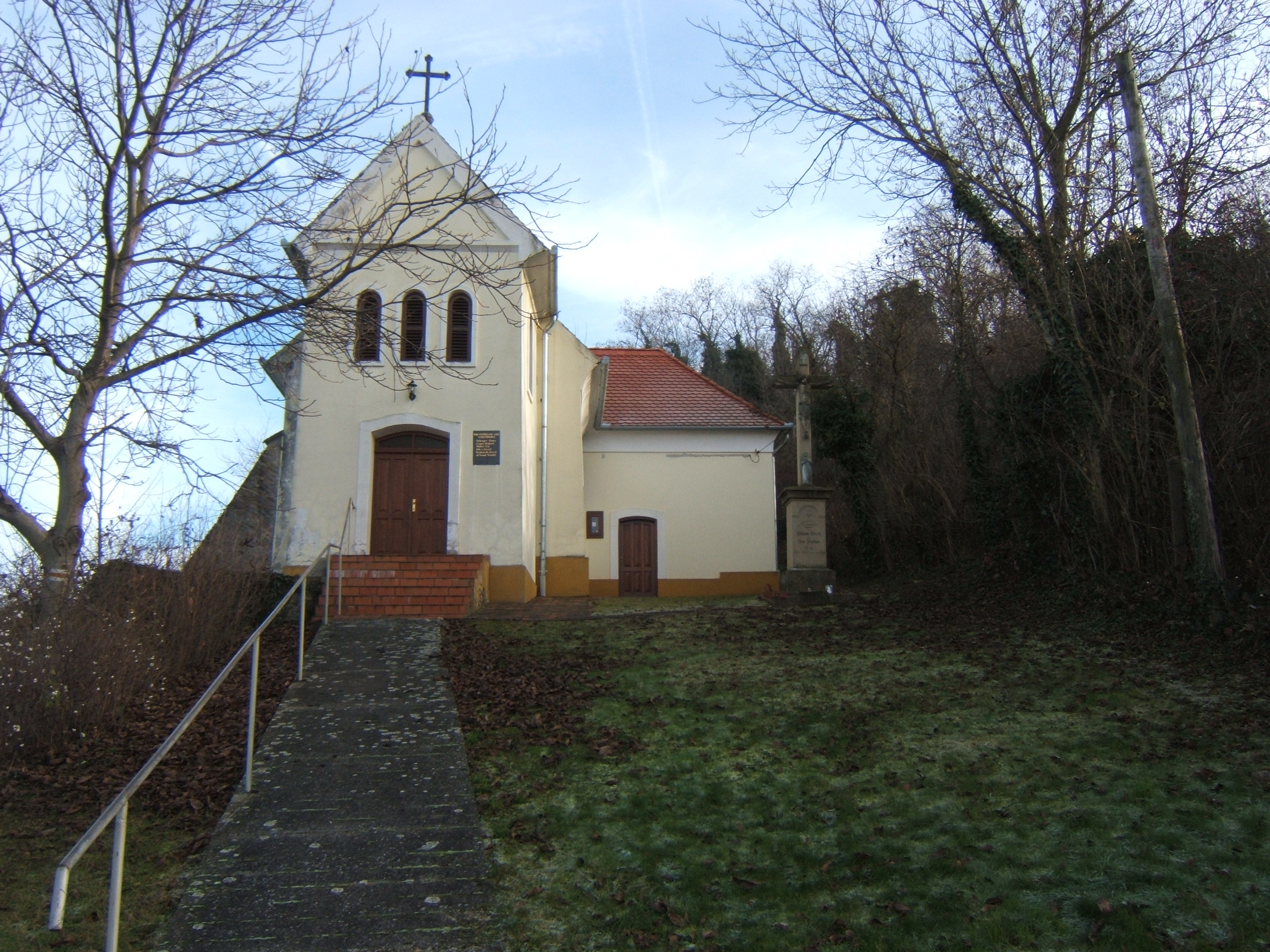 Görcsönydoboka, a cseledobokai templom, Római katolikus templom. - Baranya m., Görcsönydoboka, Nagyfa utca